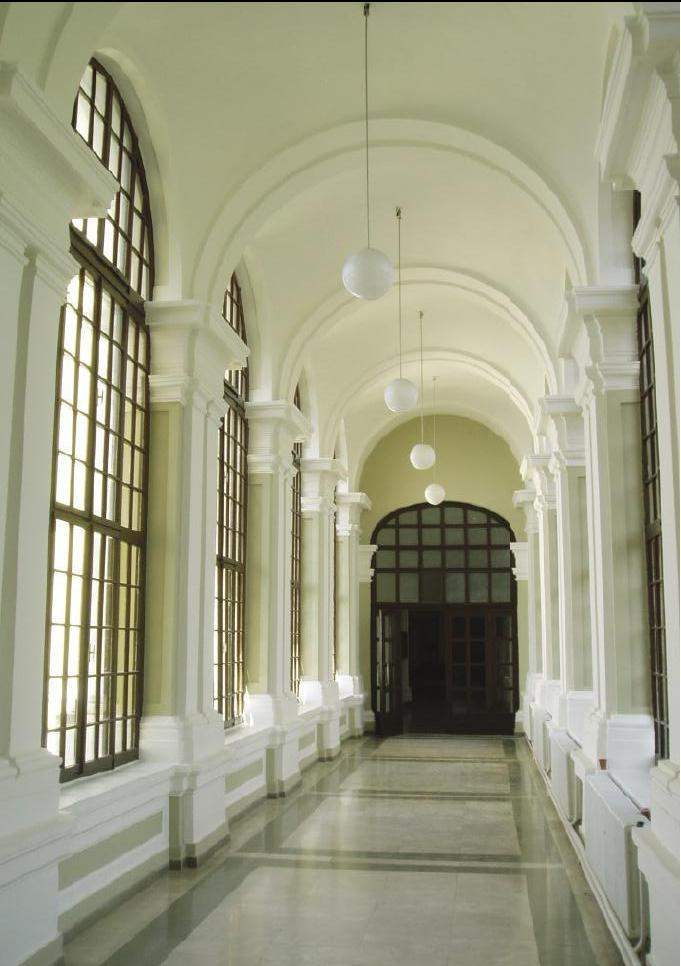 Mihovila Pavlinovića 1396; Universität Zadar